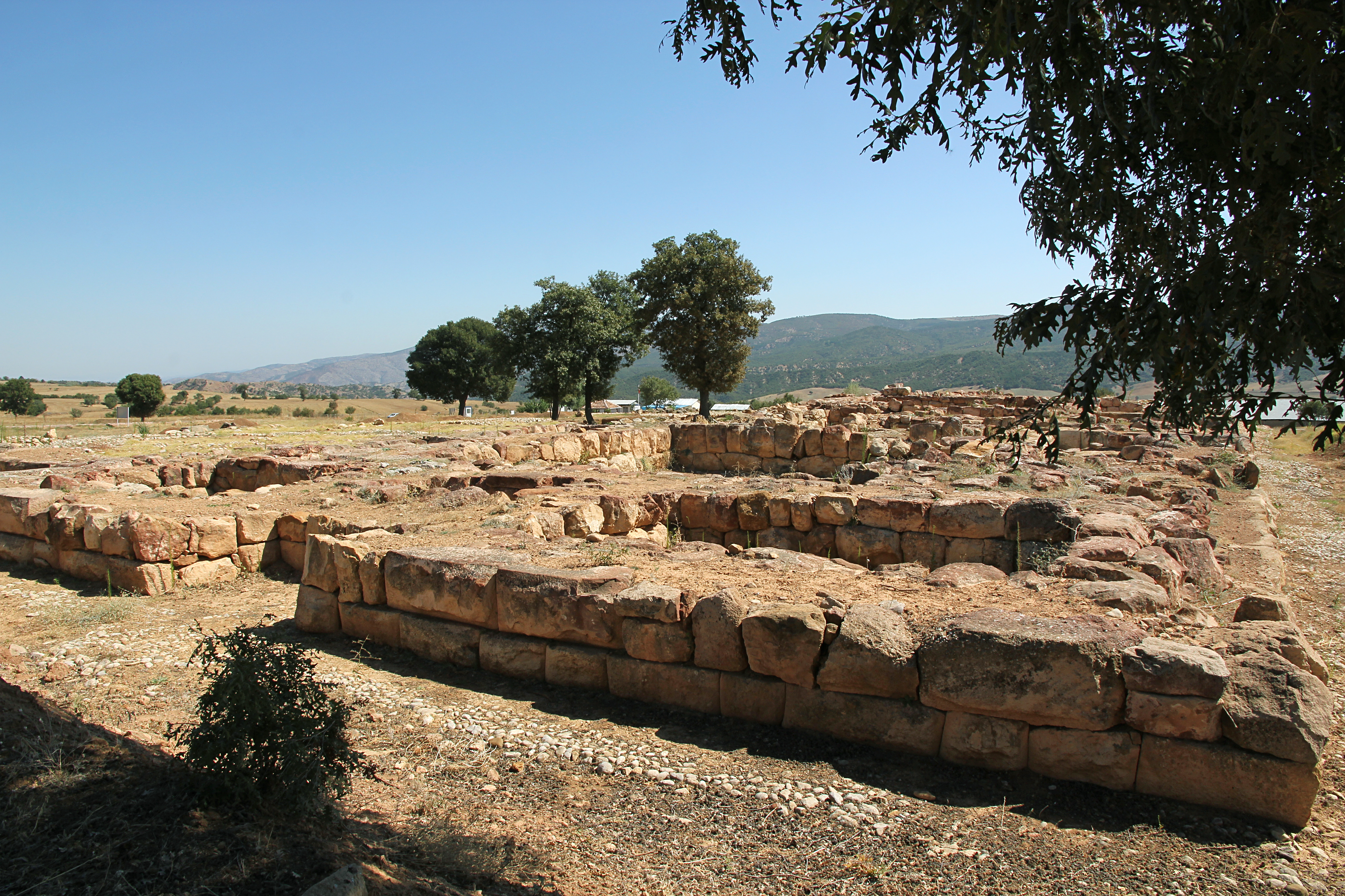 Šapinuwa/Ortaköy, hethitische Stadt bei Çorum, Zentraltürkei, Gebäude A von Westen